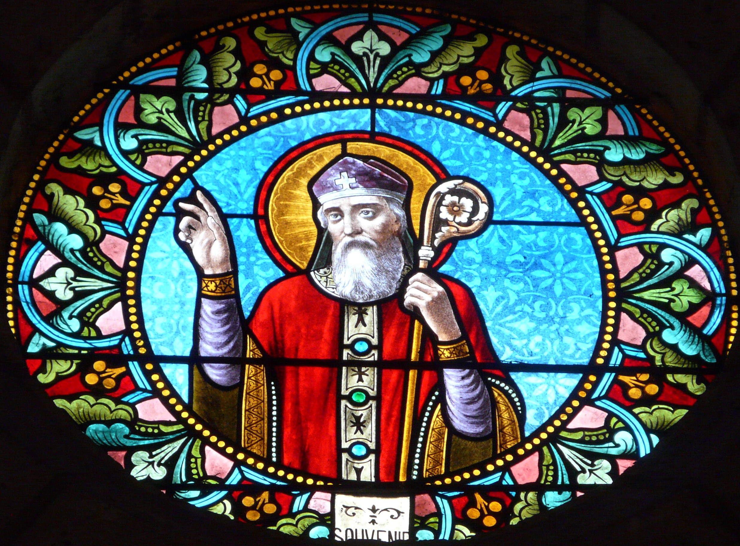 Saint Front, vitrail du chœur de l'église Saint-Pierre-ès-Liens, Lalinde, Dordogne, France.